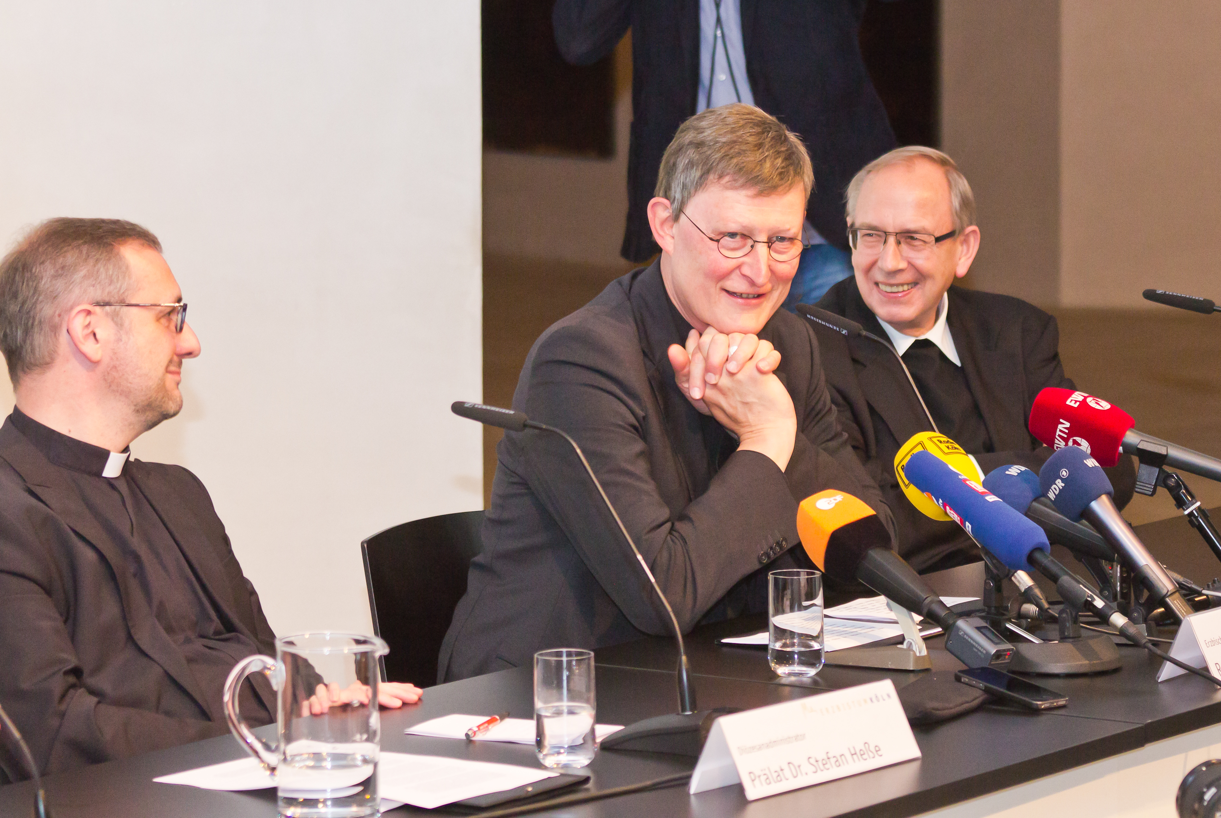 Pressekonferenz zur Ernennung von Rainer Maria Kardinal Woelki zum Erzbischof von Köln Foto: Diözesanadministrator Stefan Heße, Rainer Maria Kardinal Woelki und Domprobst Norbert Feldhoff